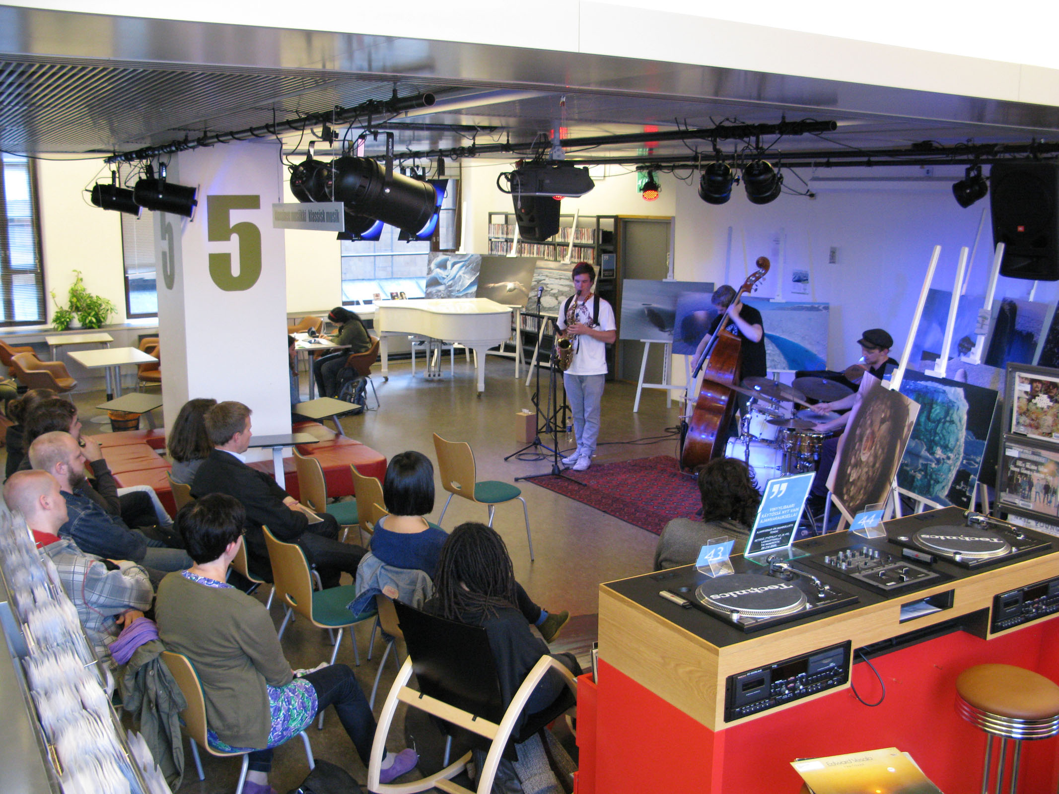 Filunki-yhtye Kirjasto 10:n stagella